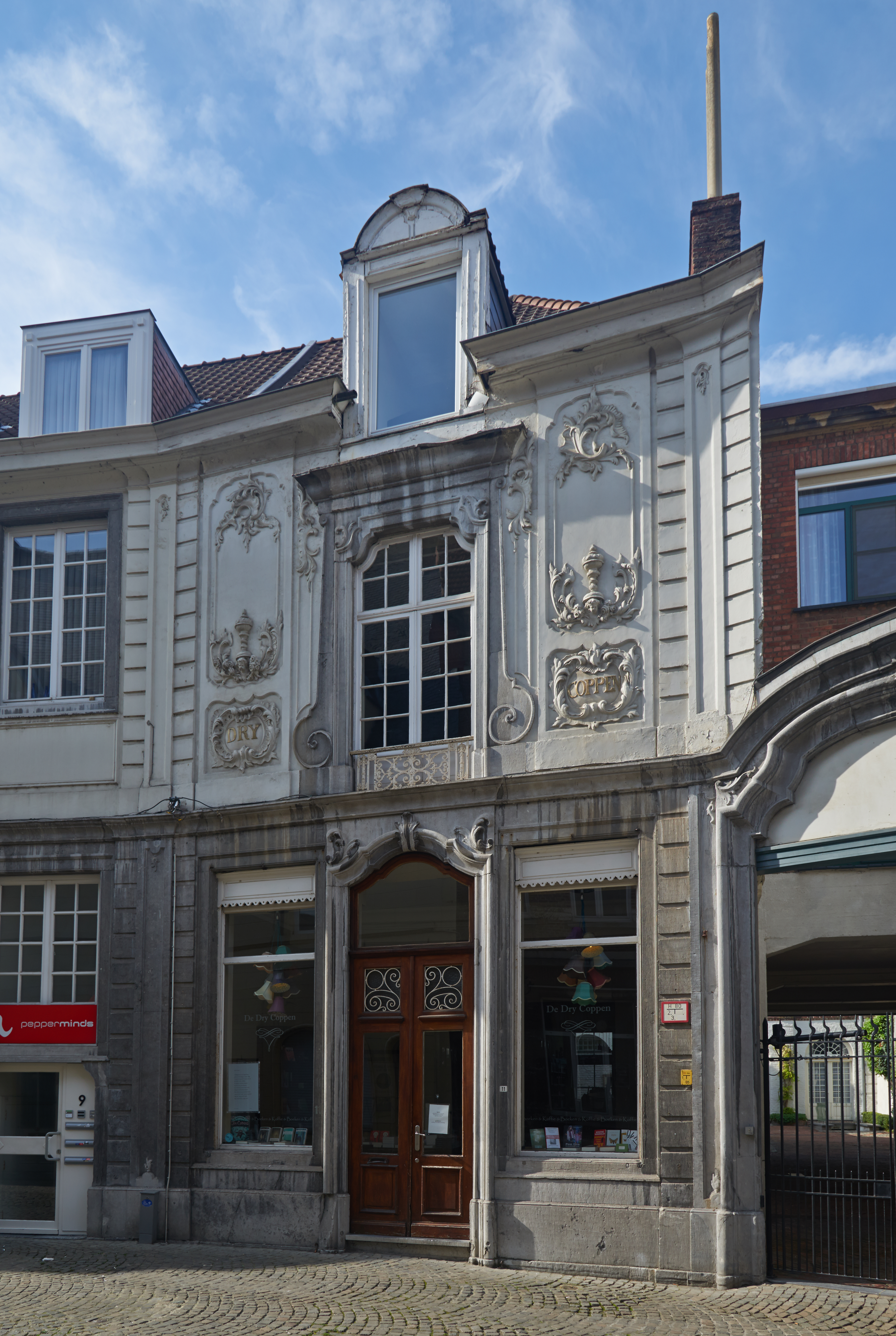 Leuven, Schrijnmakersstraat 11